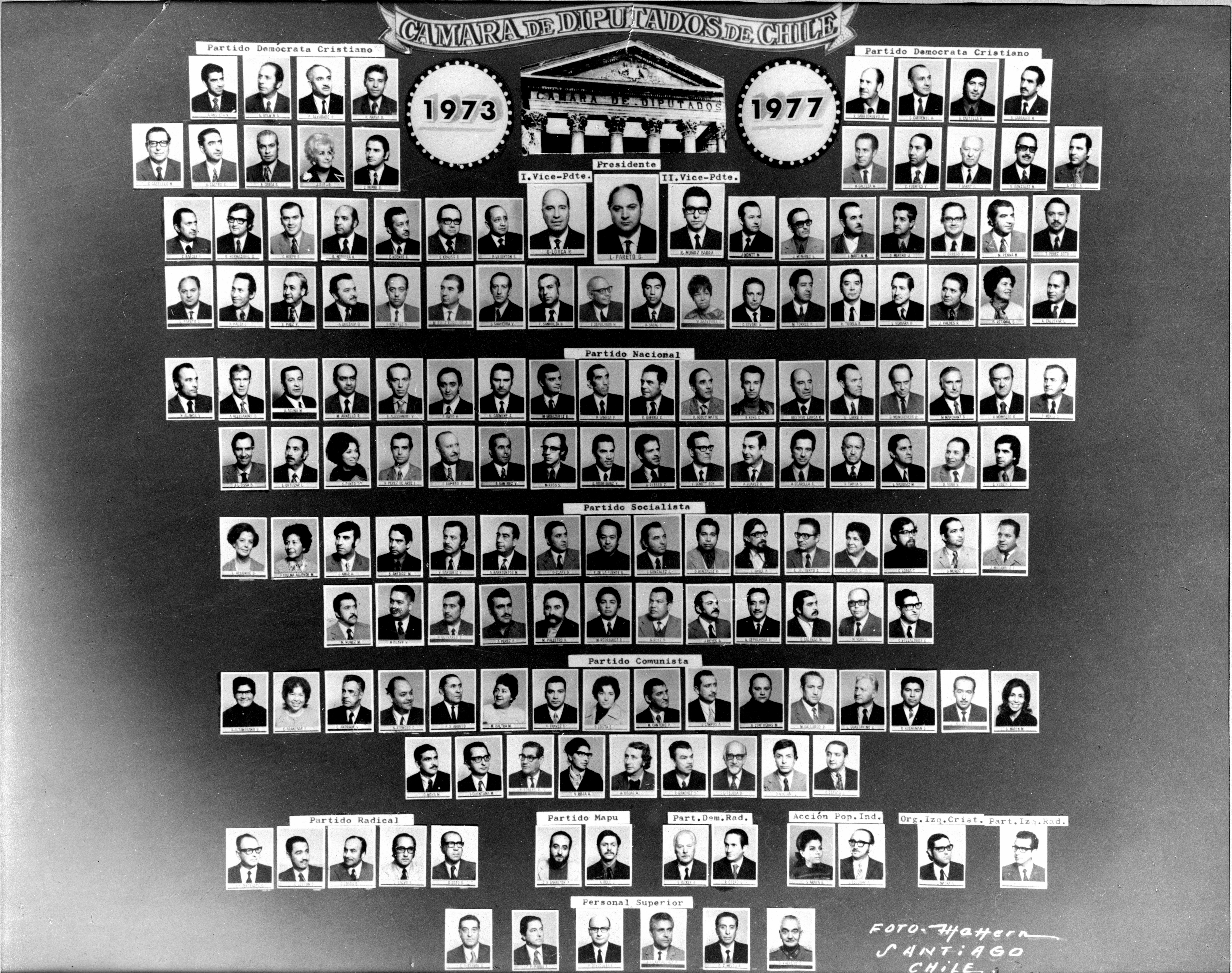 Fotografía oficial de parlamentarios de la Cámara de Diputados. Periodo del 1973 al 1977.